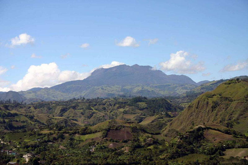 Panorámica del Complejo Volcánico Doña Juana.